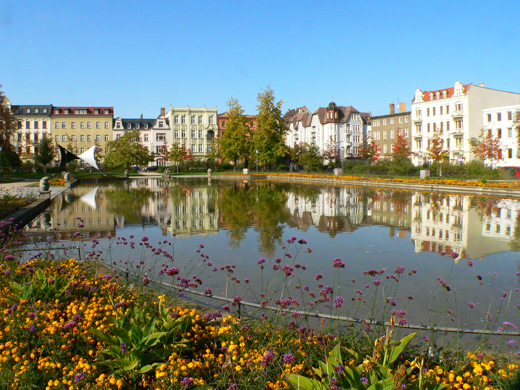 Cottbus - Theaterteich